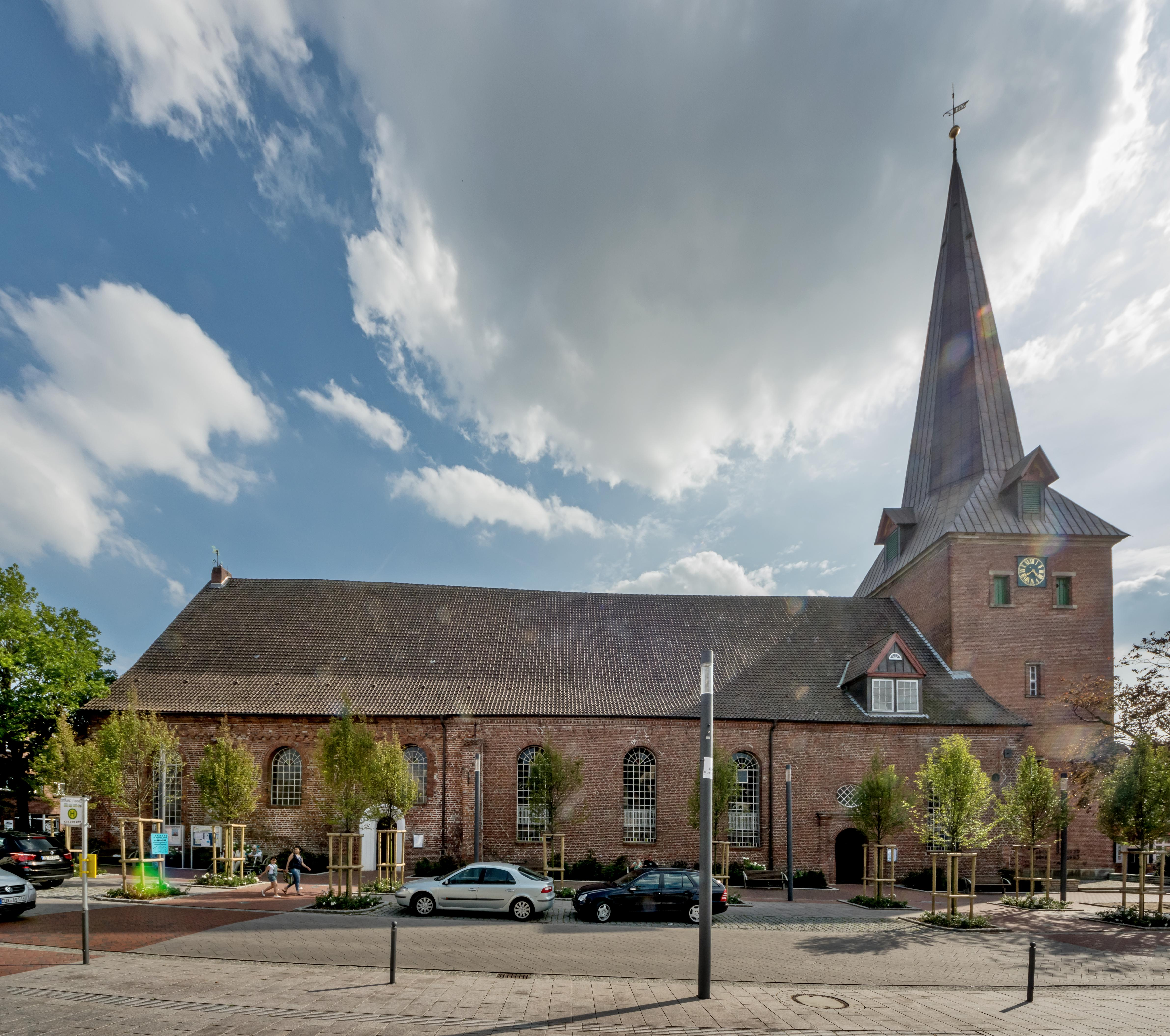 Bilder aus Otterndorf Denkmalgeschützte Gebäude St. Severi-Kirche Otterndorf